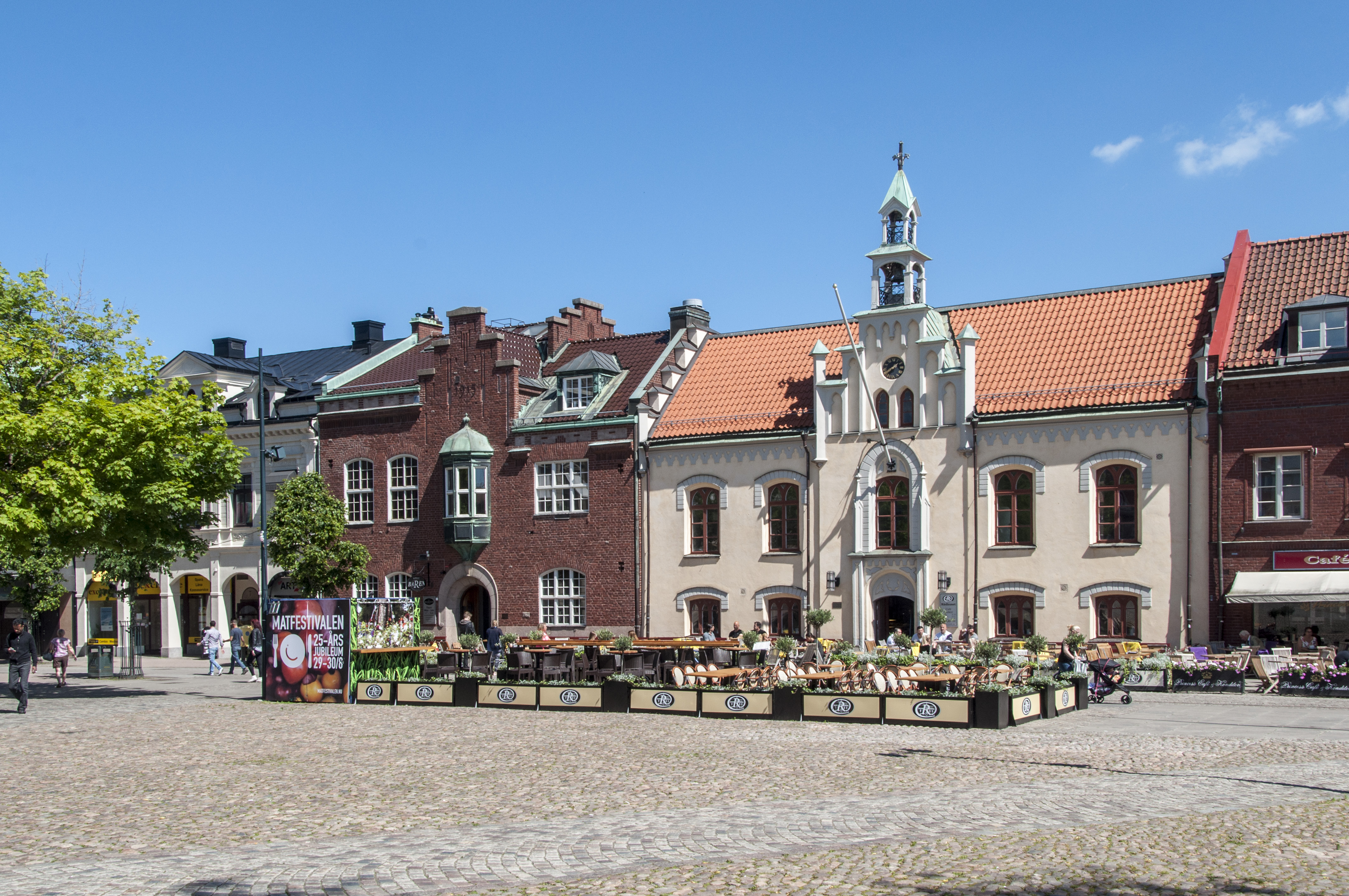 Rådhuset i Skövde, uppfört 1775-76. Arkitekt troligen Sven Westman. Ombyggt 1853. Arkitekt Löjtnant Hjalmar Wijnbladh. Utbyggnad med kaslihus 1915. Arkitekt P.O Hallman